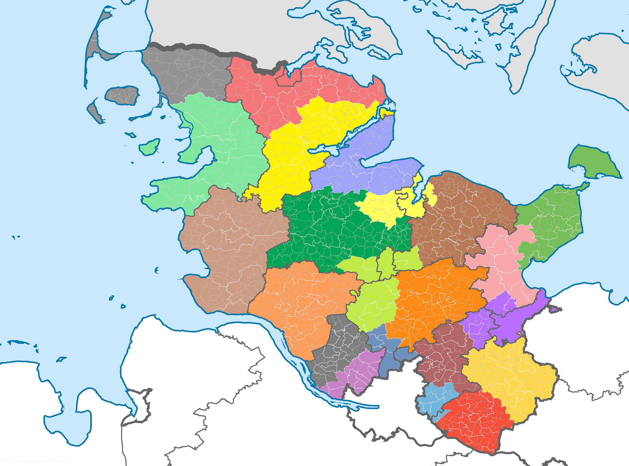 Karte der Amtsgerichtsbezirke in Schleswig-Holstein Bezirk des Landgerichtes Flensburg: Amtsgericht Niebüll Amtsgericht Flensburg Amtsgericht Husum Amtsgericht Schleswig Bezirk des Landgerichtes Itzehoe: Amtsgericht Meldorf Amtsgericht Itzehoe Amtsgericht Elmshorn Amtsgericht Pinneberg Bezirk des Landgerichtes Kiel: Amtsgericht Eckernförde Amtsgericht Rendsburg Amtsgericht Kiel Amtsgericht Plön Amtsgericht Neumünster Amtsgericht Bad Segeberg Amtsgericht Norderstedt Bezirk des Landgerichtes Lübeck: Amtsgericht Oldenburg in Holstein Amtsgericht Eutin Amtsgericht Lübeck Amtsgericht Ahrensburg Amtsgericht Ratzeburg Amtsgericht Reinbek Amtsgericht Schwarzenbek